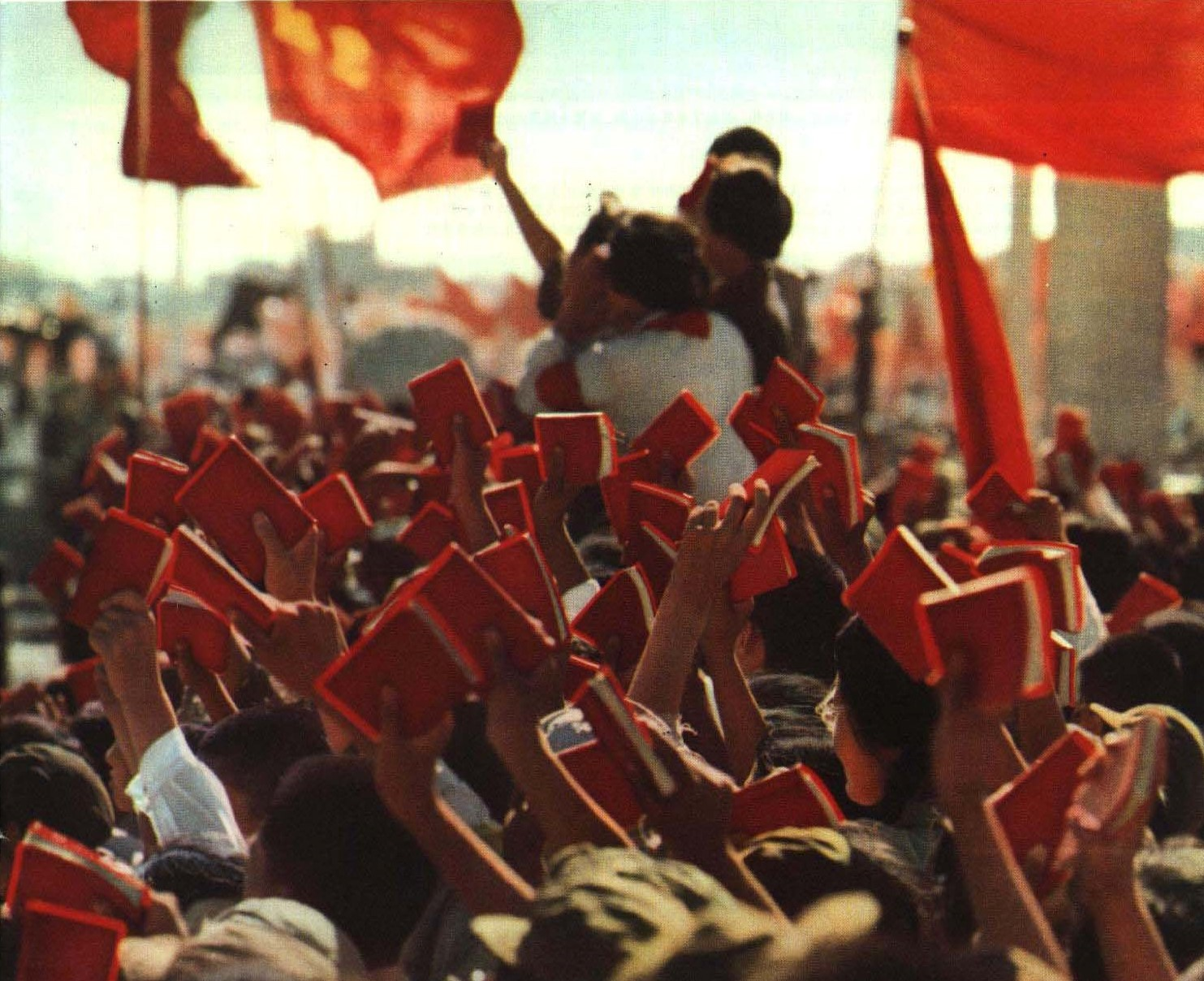 1967-07 1967年 民众手中举起毛泽东语录